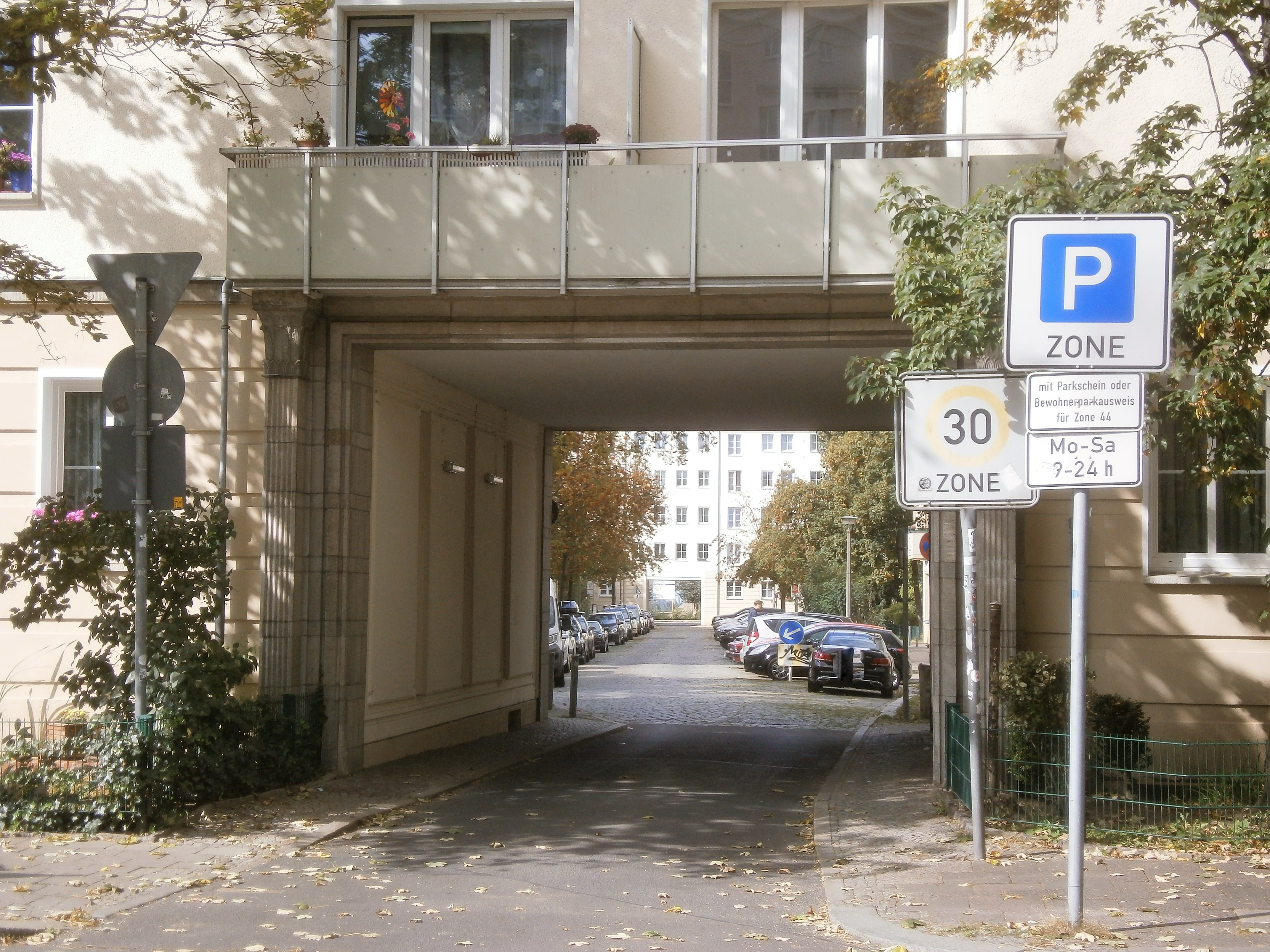 Die Kniprodestraße ist ein Verkehrszug im Berliner Bezirk Pankow, Ortsteil Prenzlauer Berg mit Grundstückszählung in Hufeisen. Bild: Durchfahrt zur Heinz-Kapelle-Straße zwischen 110 und 110a.